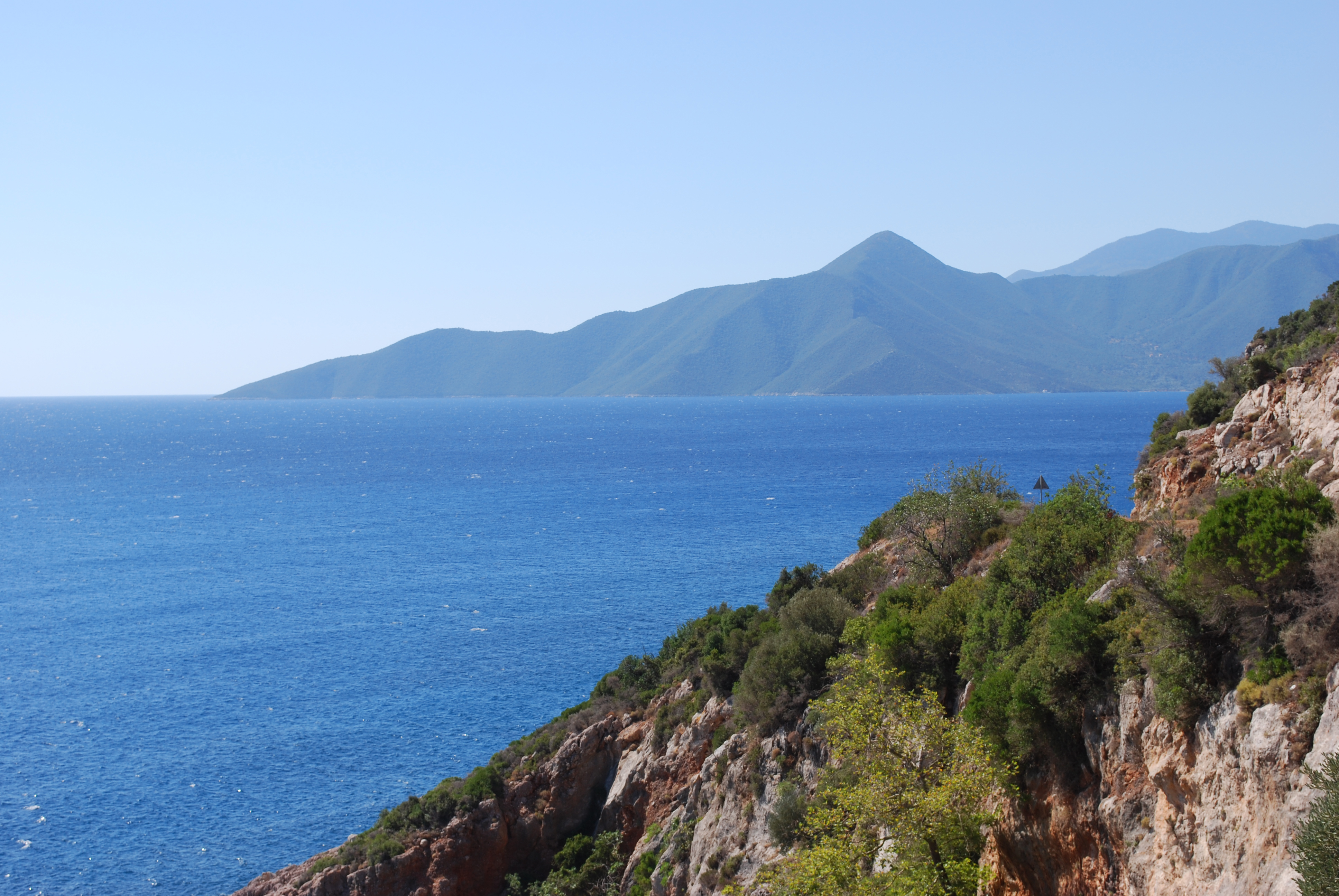 Vue du golfe Argolique, à proximité d'Astros.